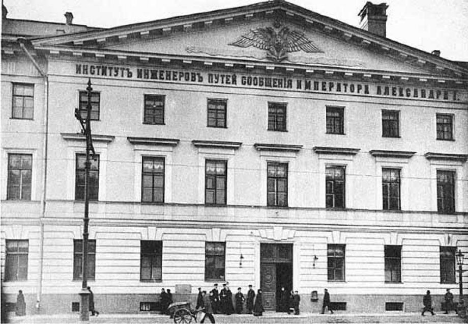 Институт инженеров путей сообщения — учебное заведение Российской империи.